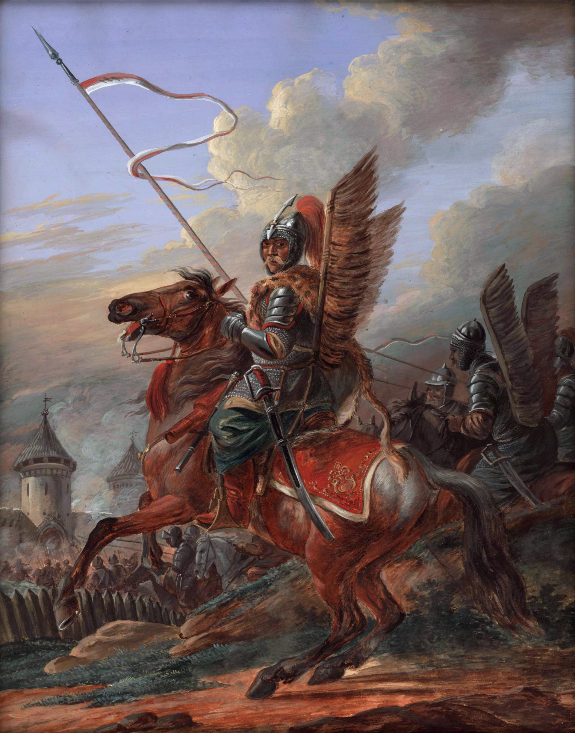 Беларуская (тарашкевіца): Гусар (Husar)